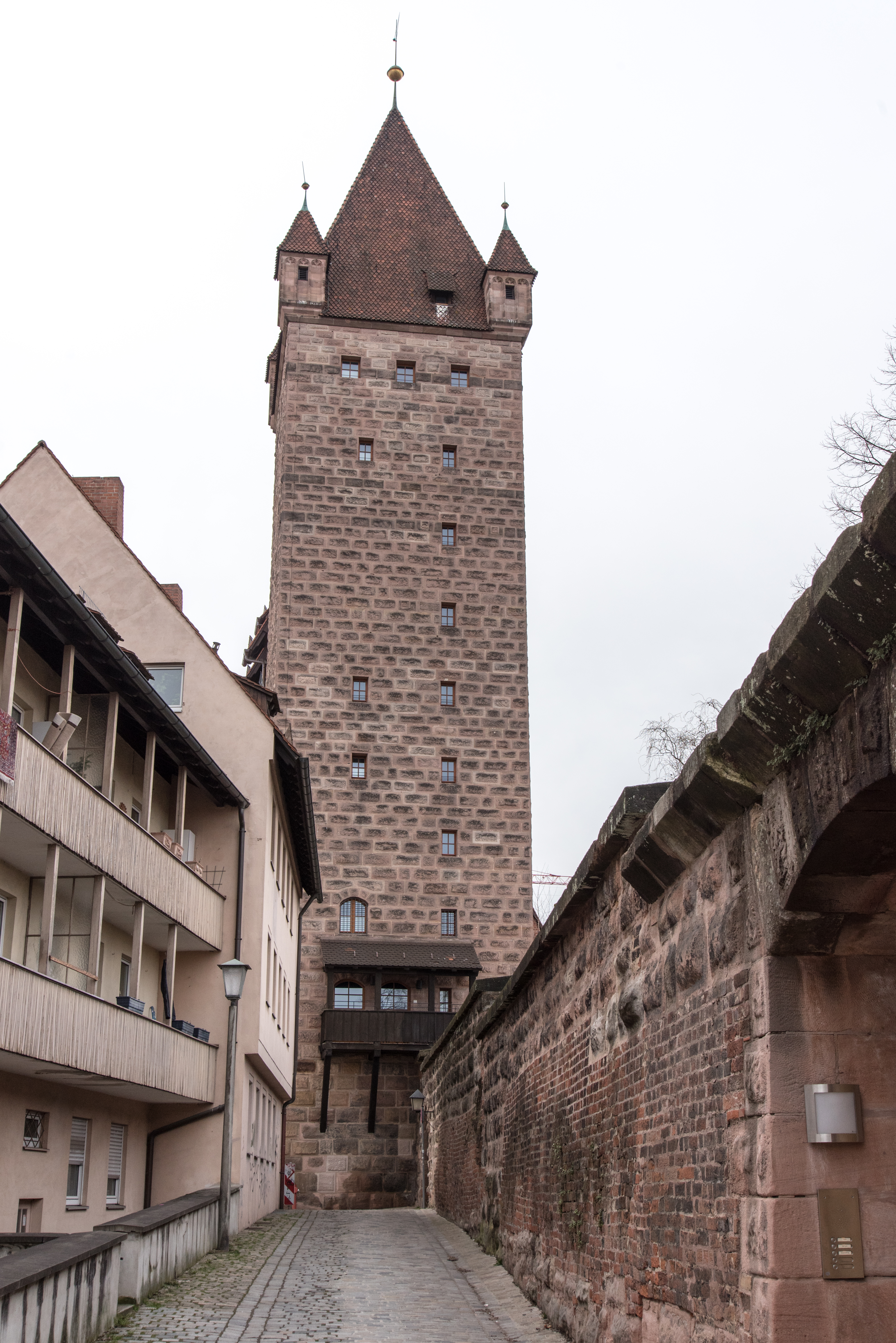 Nürnberg, Stadtbefestigung, Schwarzes A, Vestnertormauer, Stadtseite